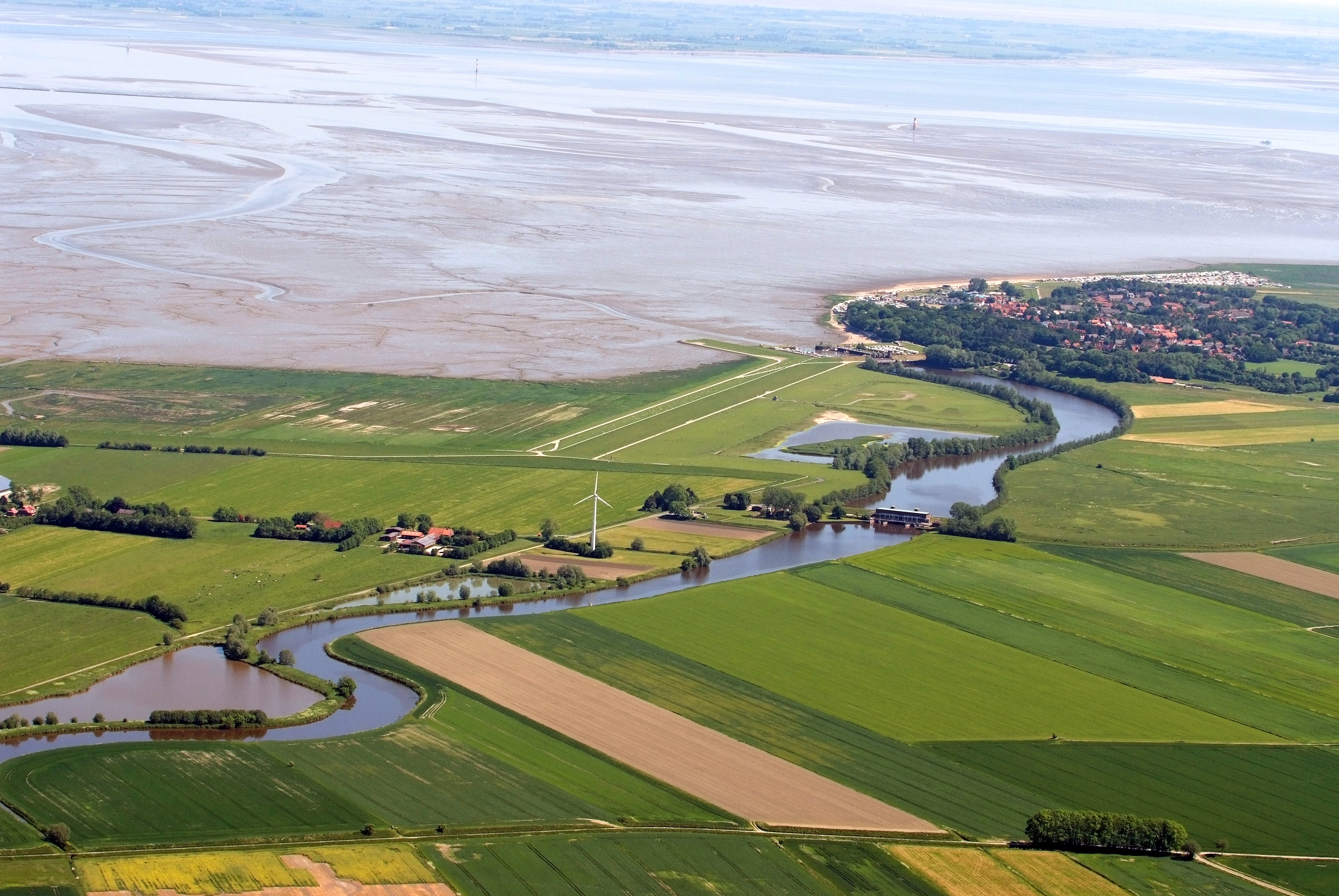 Fotoflug vom Flugplatz Nordholz-Spieka über Cuxhaven und Wilhelmshaven